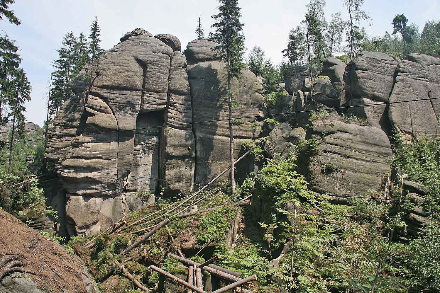 Písková rokle v NPR Broumovské stěny - dolní část